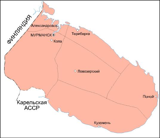 map of Murmanskij okrug (1931)